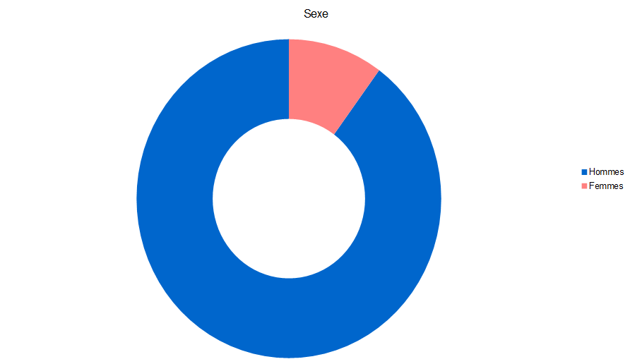 Diagramme circulaire représentant le sexe des personnalités qui ont donné leur nom à une ou plusieurs voies de Saint-Priest.